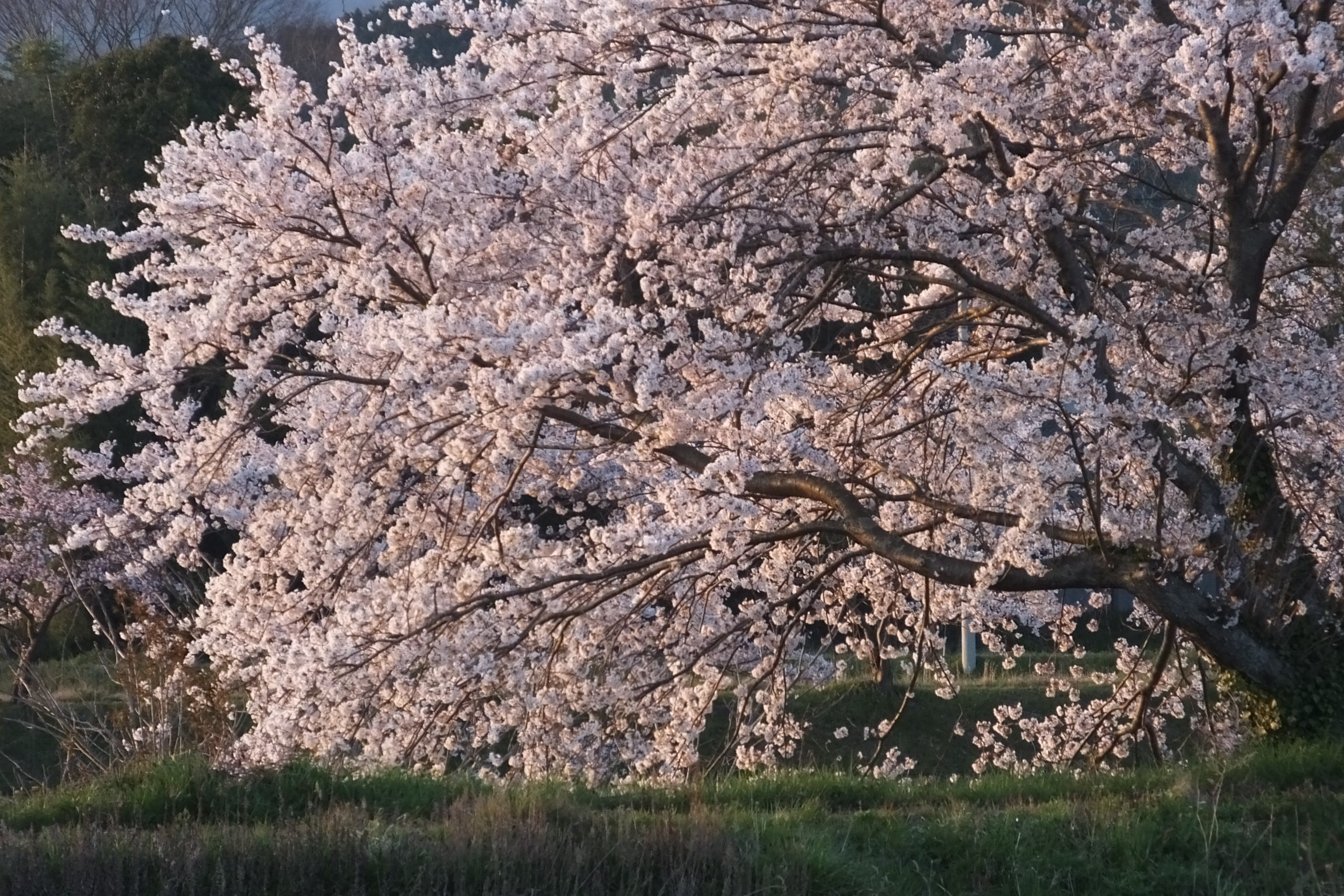 2020-04-07 Prunus × yedoensis Tambasasayama,Hyogo(丹波篠山市のソメイヨシノ)